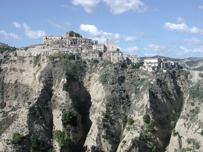 Comune di Tursi (MT)